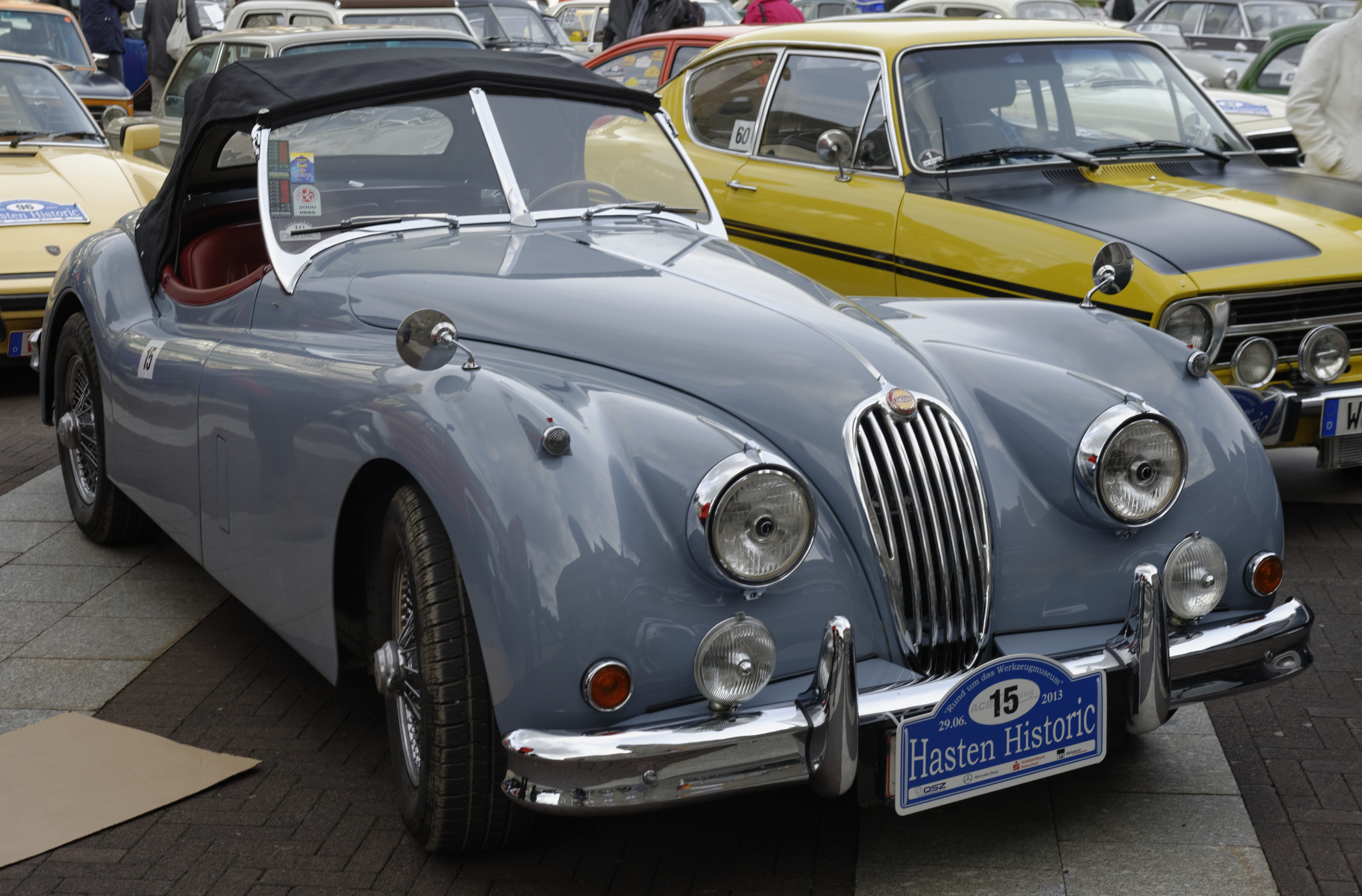 Oldtimershow in Remscheid Juni 2013